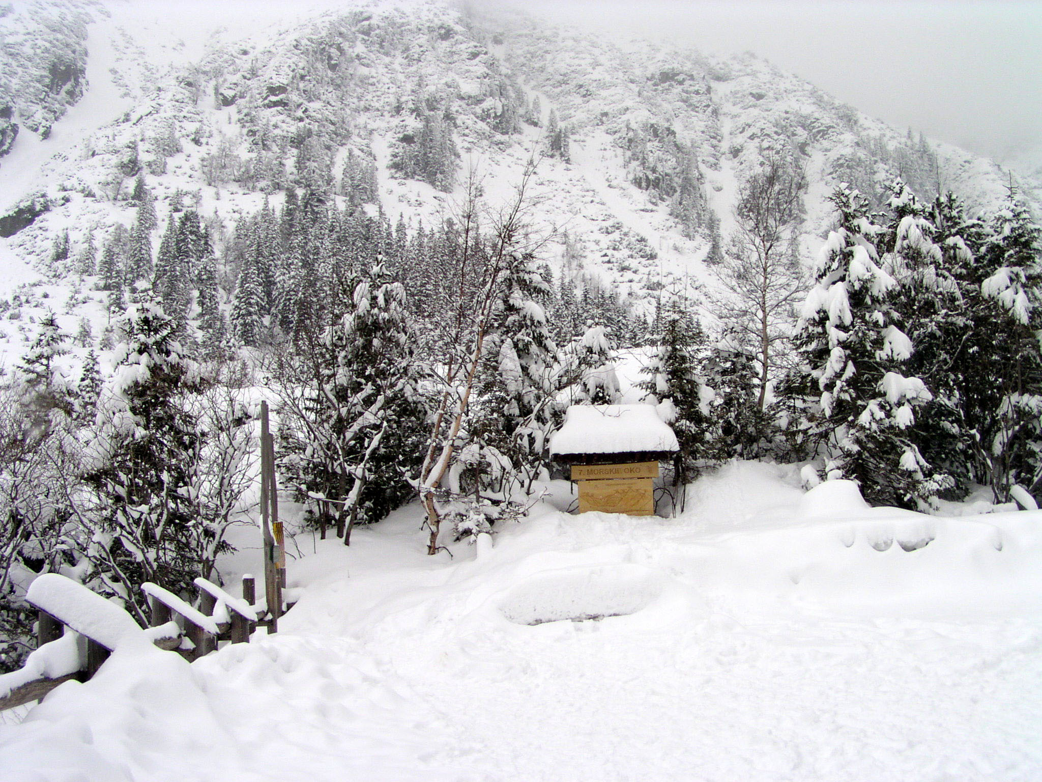 Morskie Oko, Poland in winter